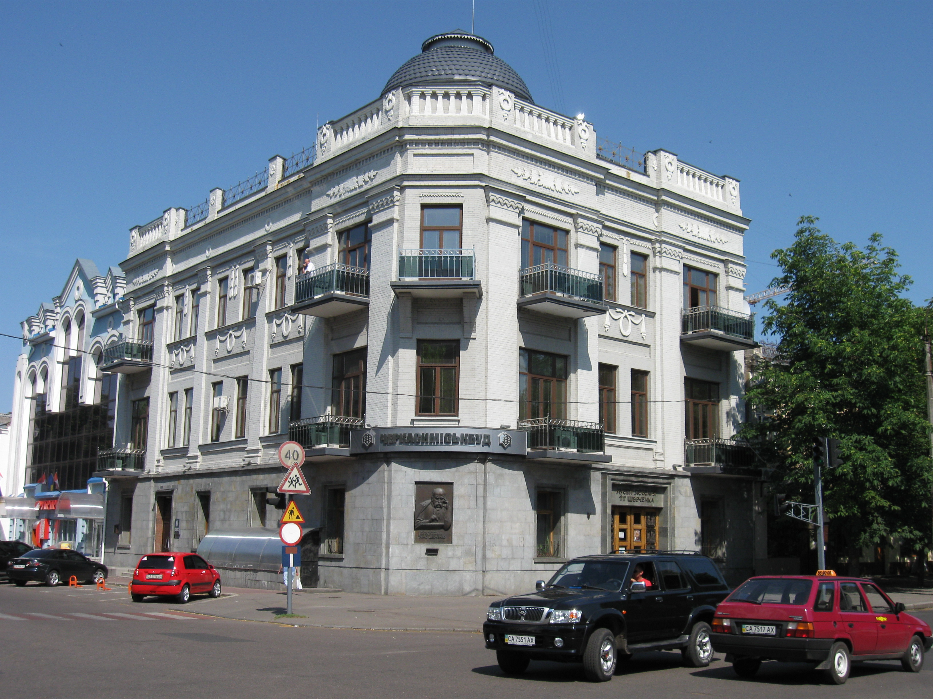 Музей_Кобзаря_Т.Г.Шевченка_в_Черкасах.jpg: Музей Кобзаря Т.Г. Шевченка в Черкасах (червень 2009 року)